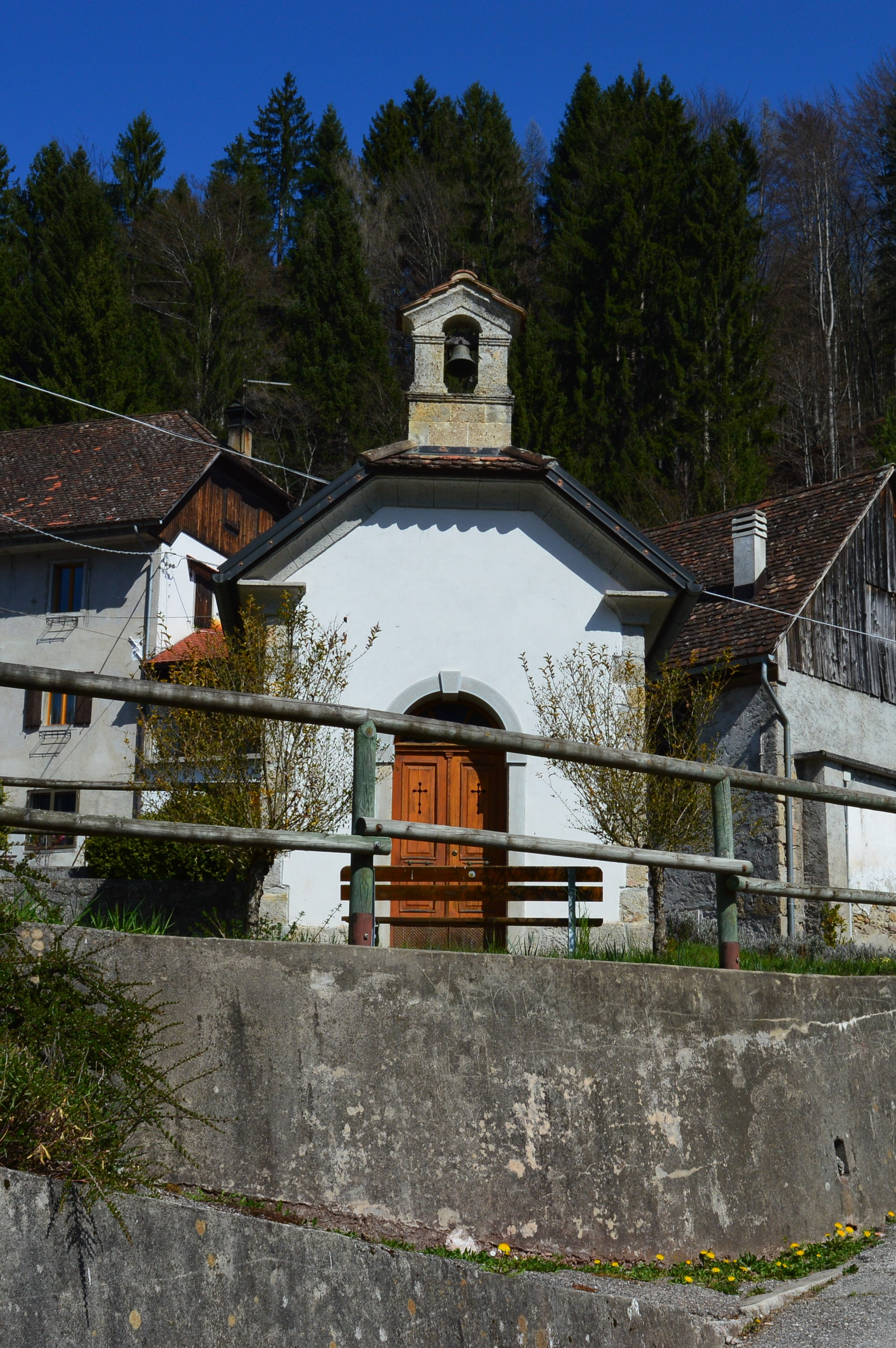 Chiesetta di Santa Maria di Caravaggio, Facciata